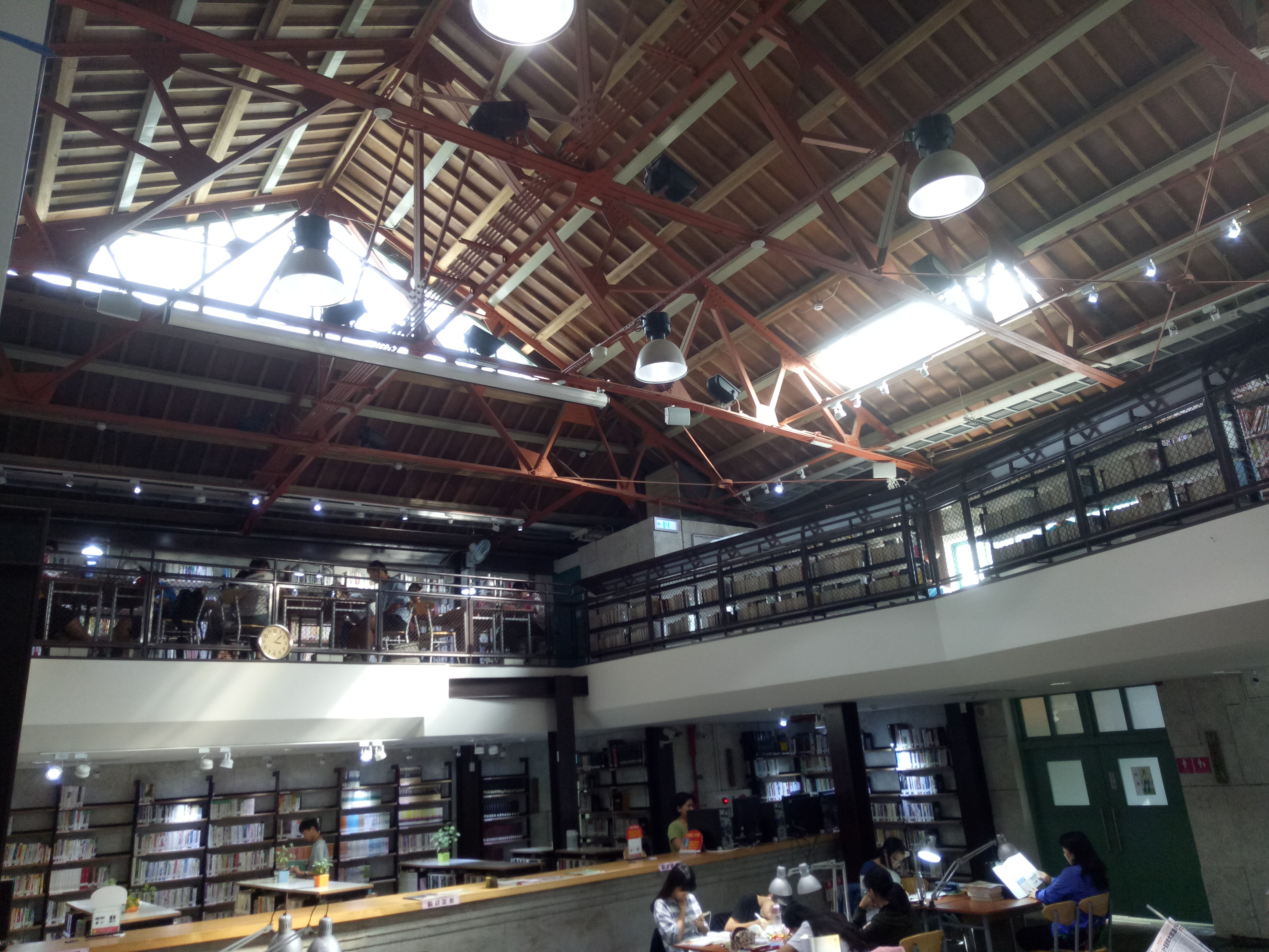 桃園市立圖書館大湳分館（八德中正堂）內部。